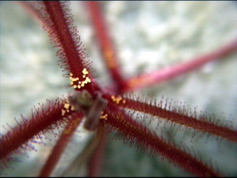 Blick von oben auf Drosera hartmeyerorum mit den Licht reflektierenden gelben Emergenzen. Es handelt sich um ein eigenes Bild aus unserer DVD "Drosera: Schnelltentakel und Landescheinwerfer". Bild (Screenshot): S. Hartmeyer 2005